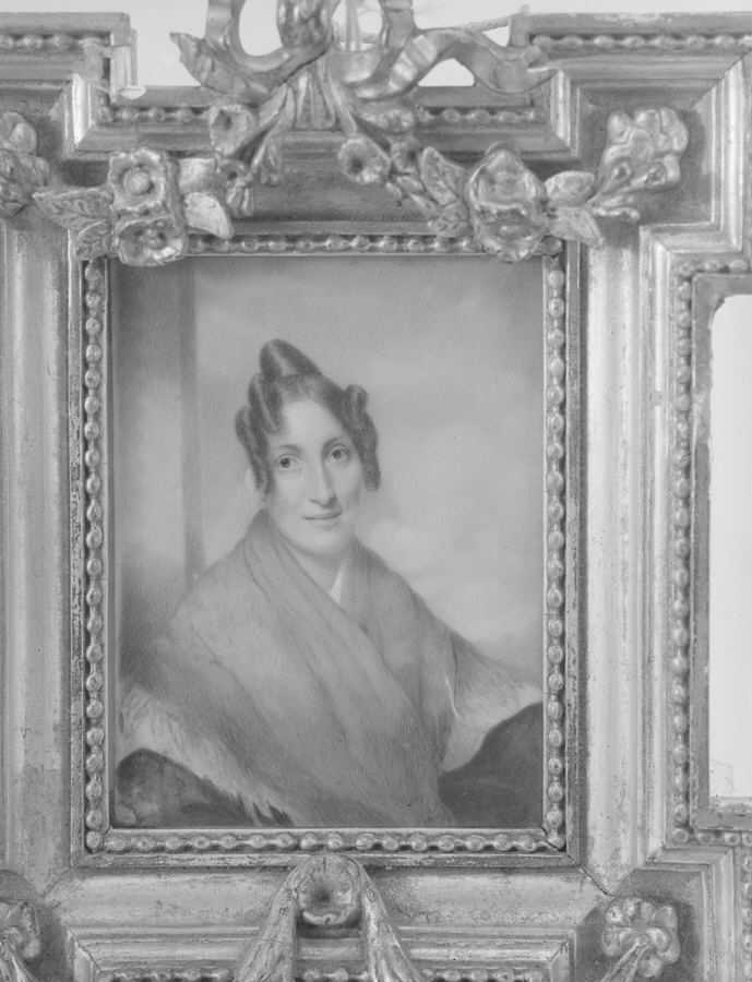 Painting, miniature; Paintings